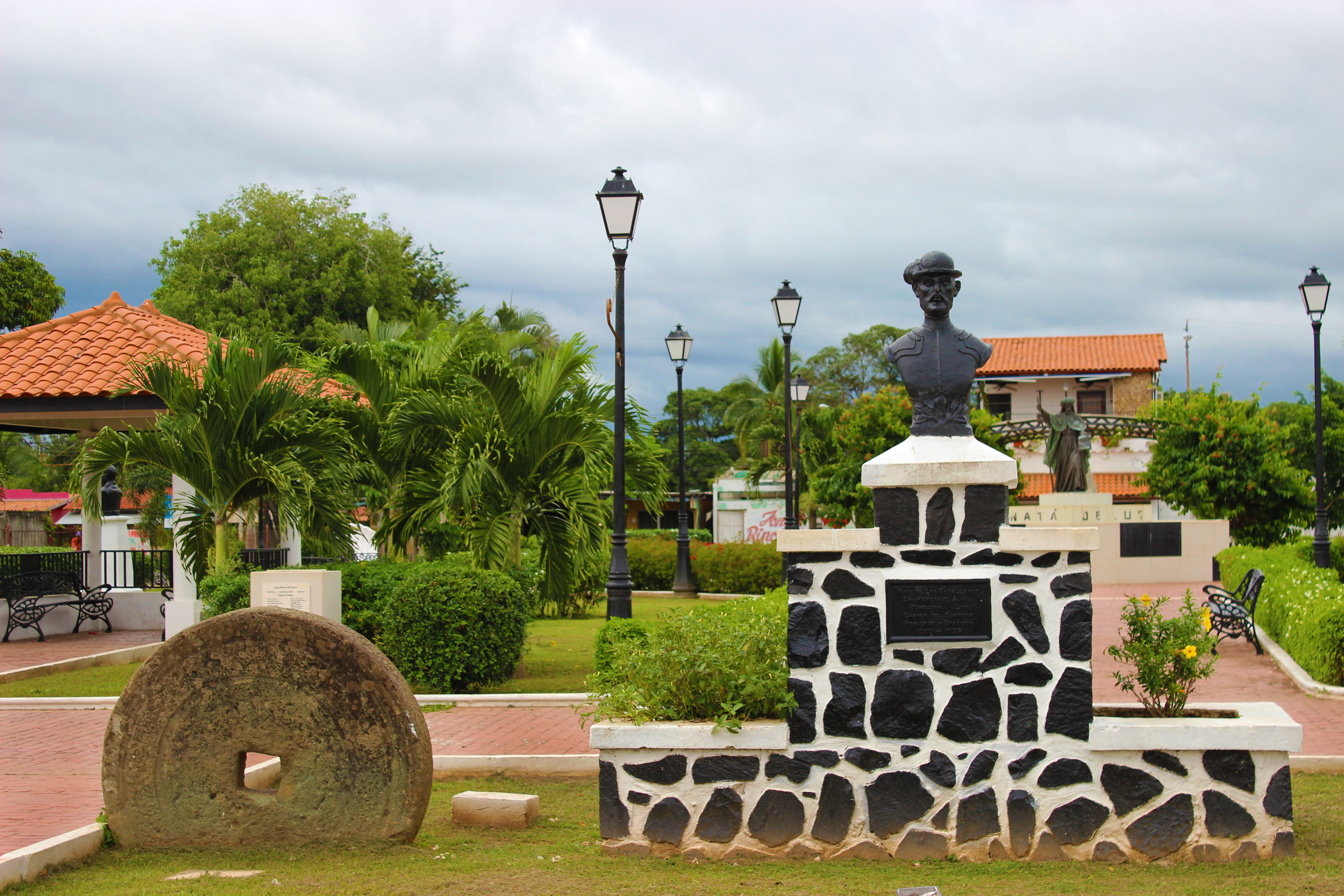 La Iglesia Parroquial de Natá fue fundada en Natá de los Caballeros en 1522 por el Gobernador Pedrarias, una de las primeras iglesias en América. Mediante Ley 61 de 1908 se destinaron los fondos para su conservación.3 Mediante la Ley 68 de 1941 fue declarado monumento histórico nacional.